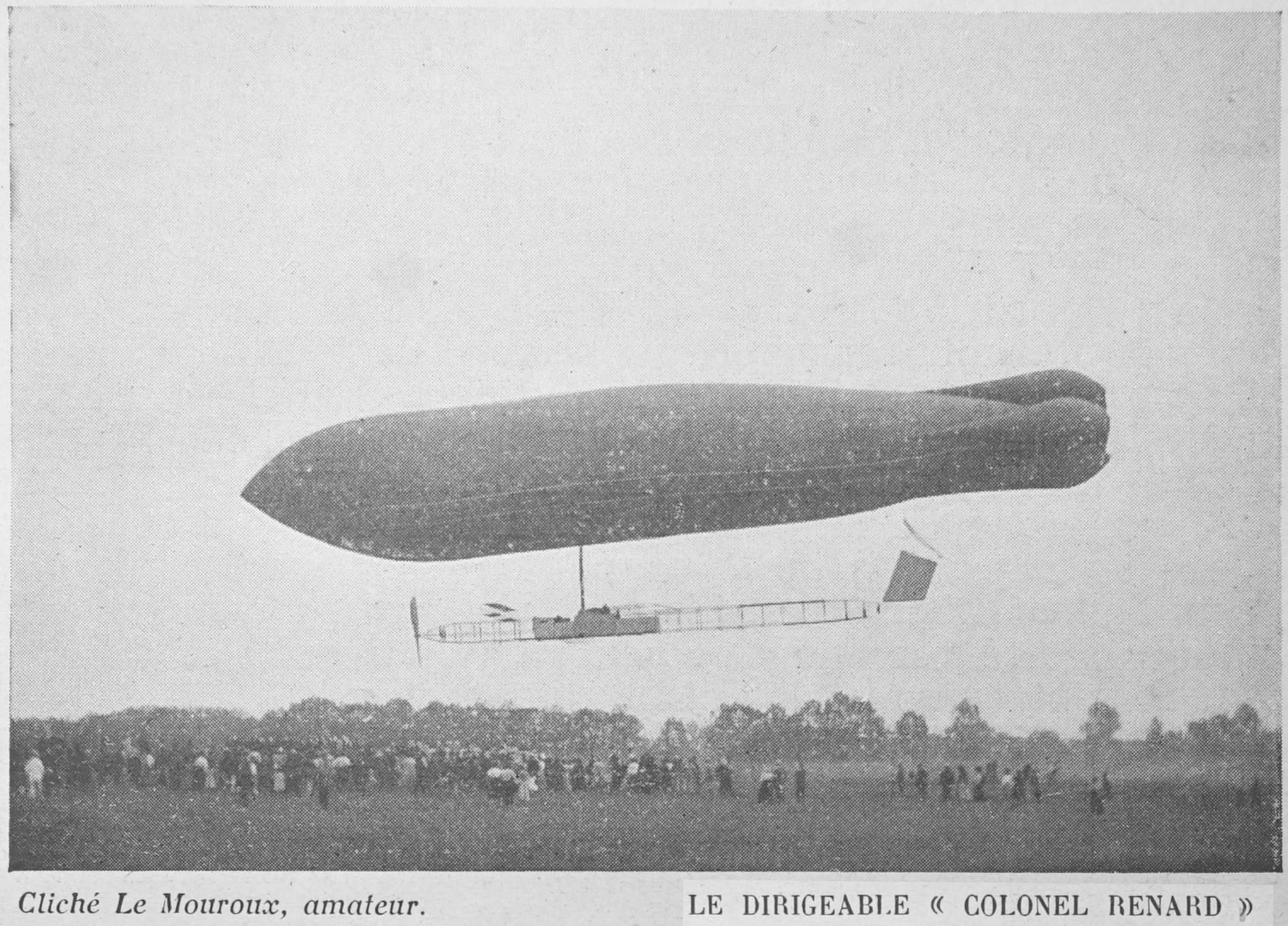 lors de la Grande Semaine d'Aviation de la Champagne (1909).